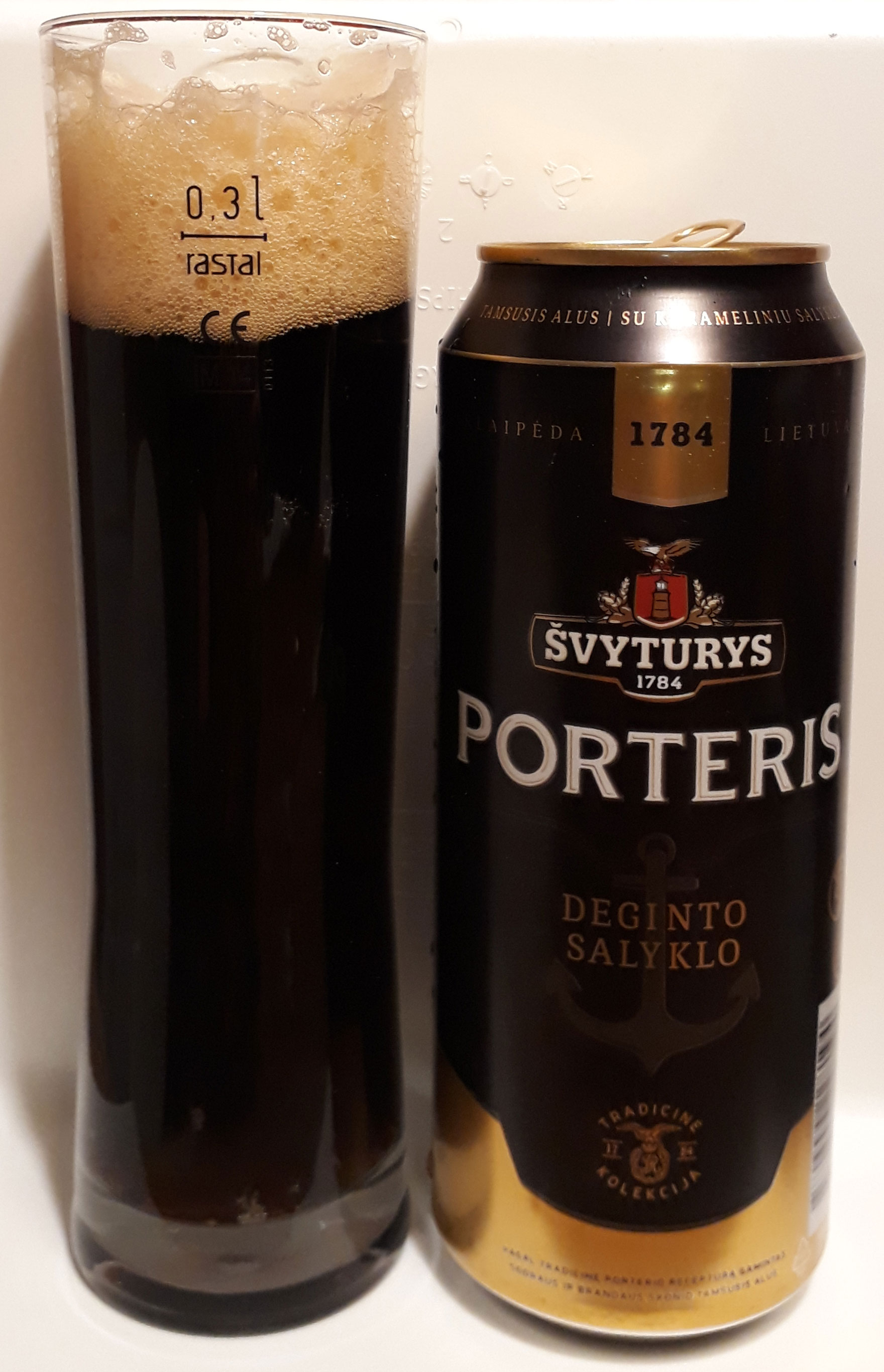 Švyturio PORTERIS Deginto salyklo